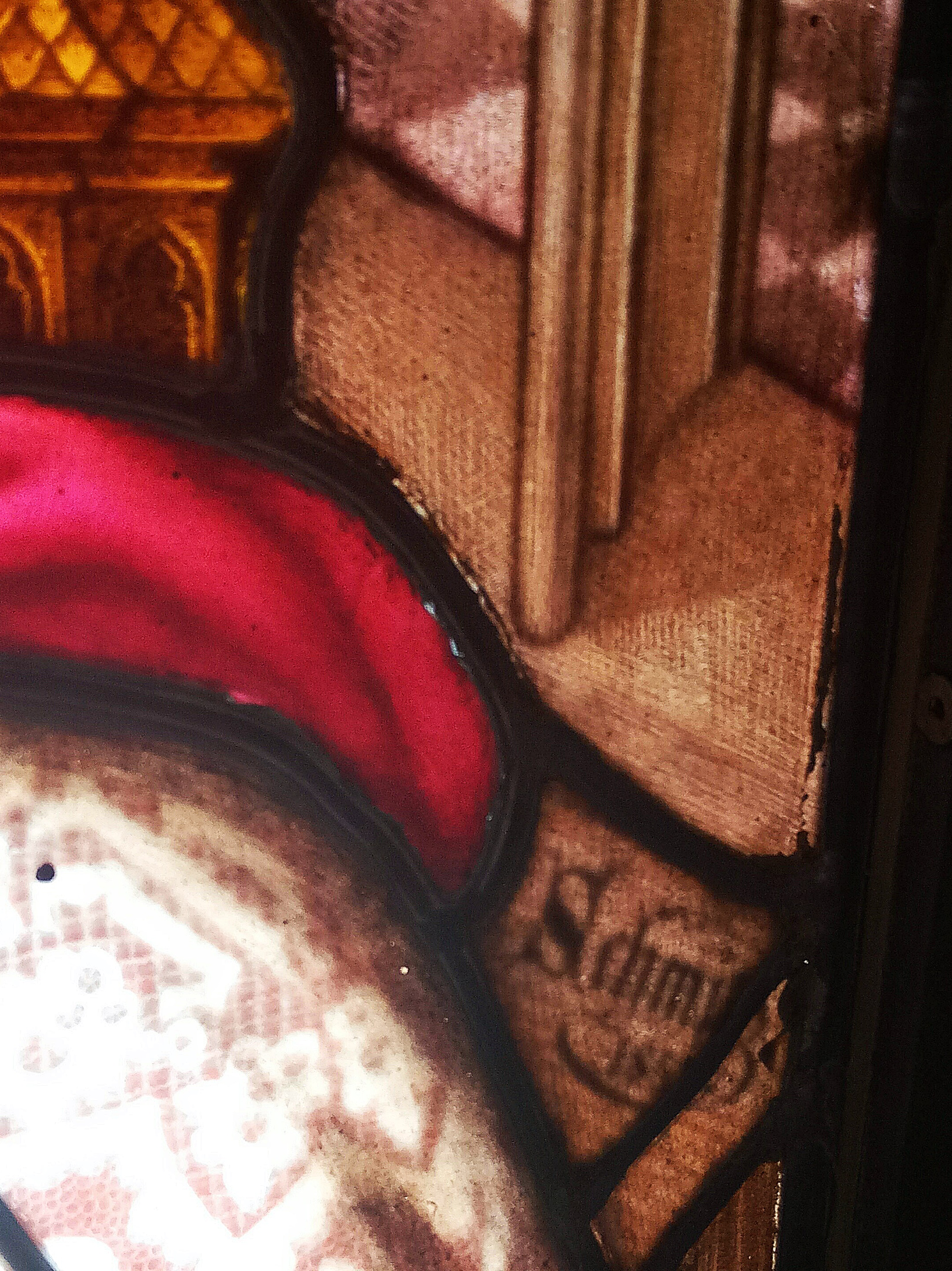 Signatur Glasmaler Michael Hubert Schmitz (1830-1898), 1858, Johanneskirche Mußbach